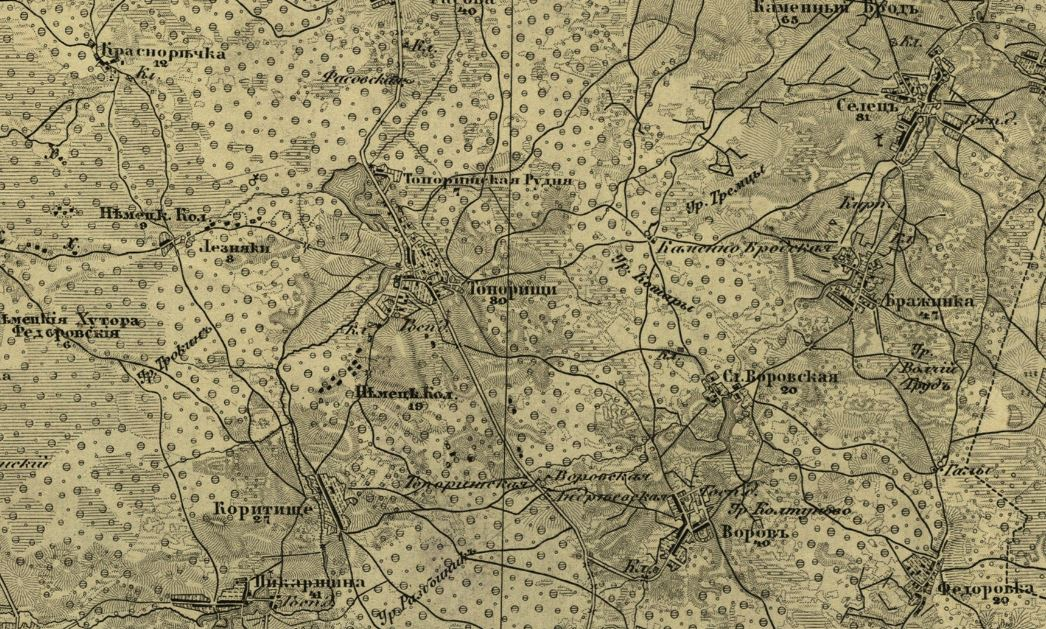 Село Топорище на історичній карті